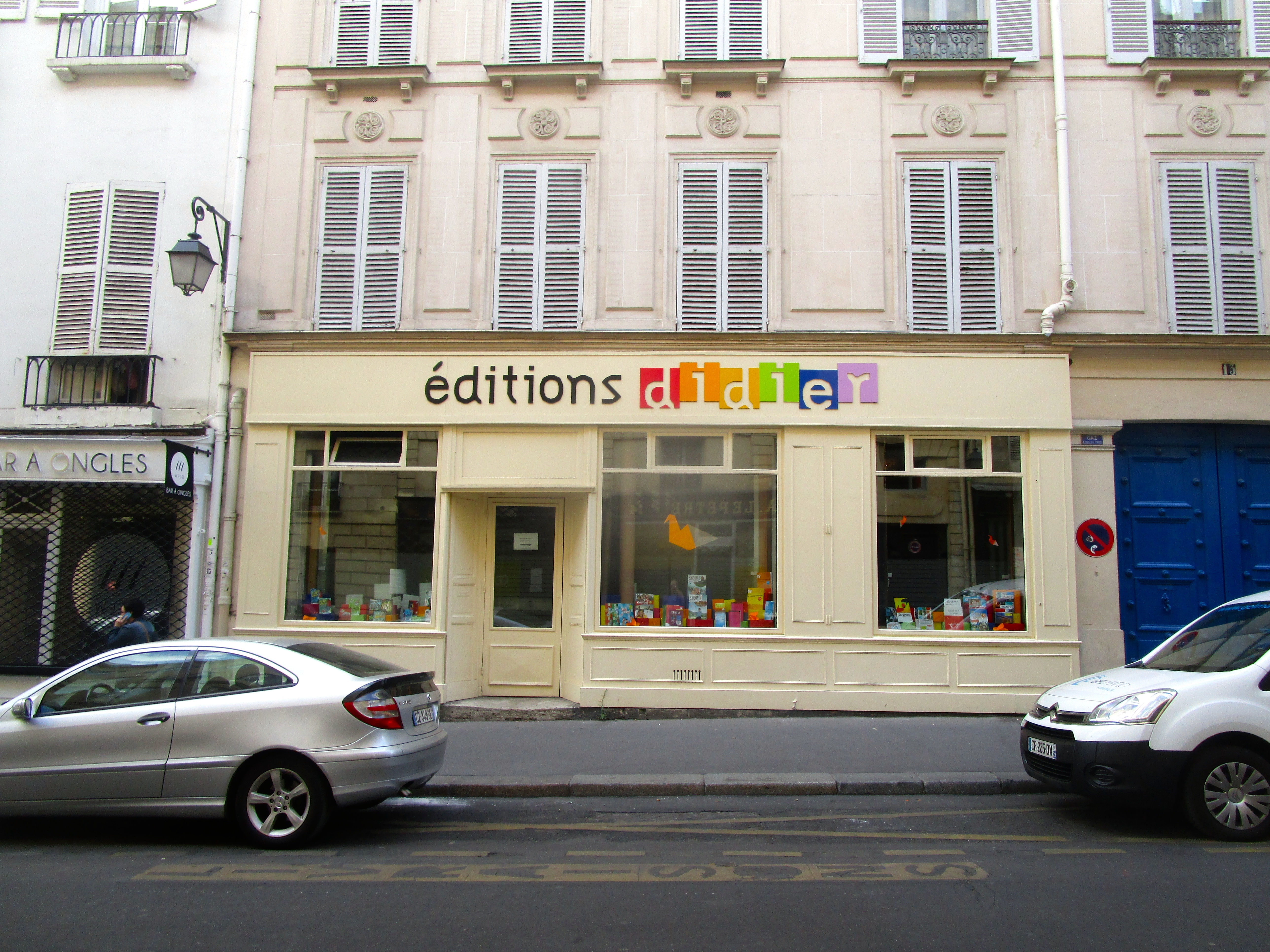 Editions Didier, 13 rue de l'Odéon, Paris.